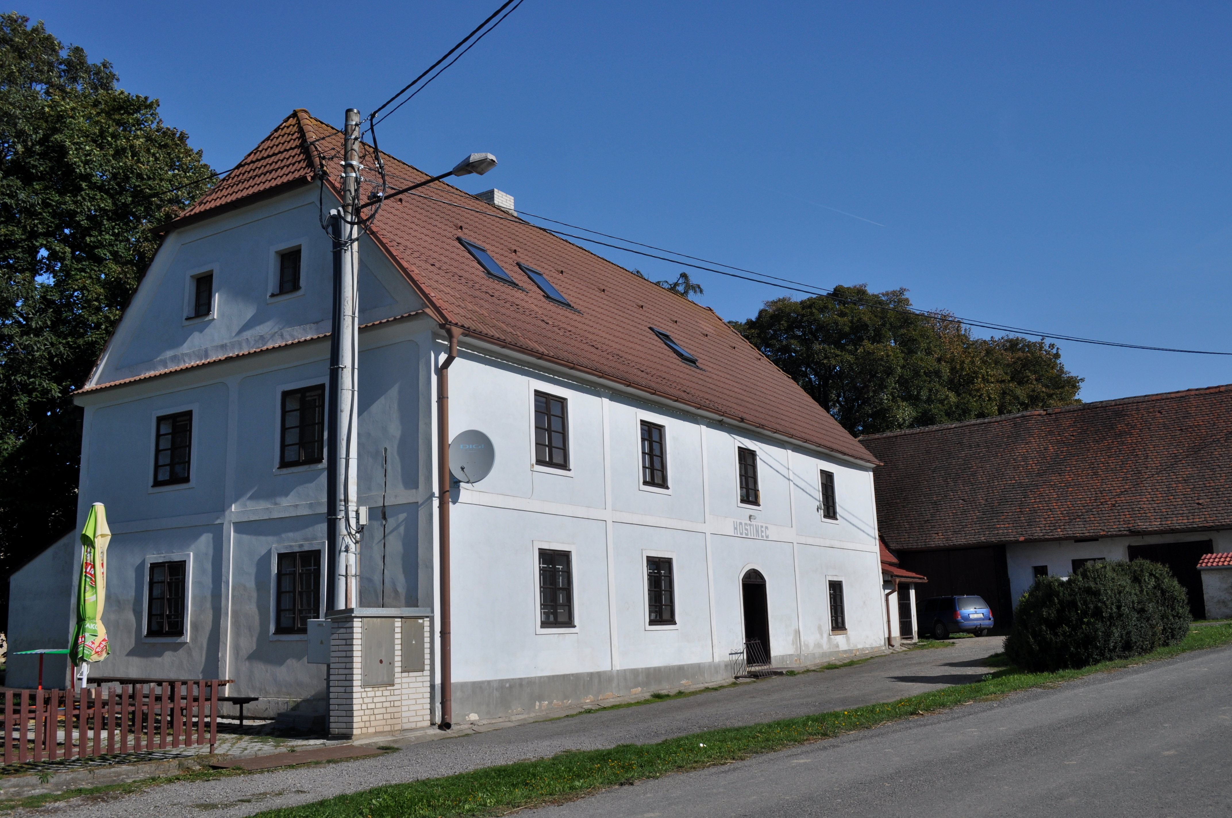 Hospoda, Krakov